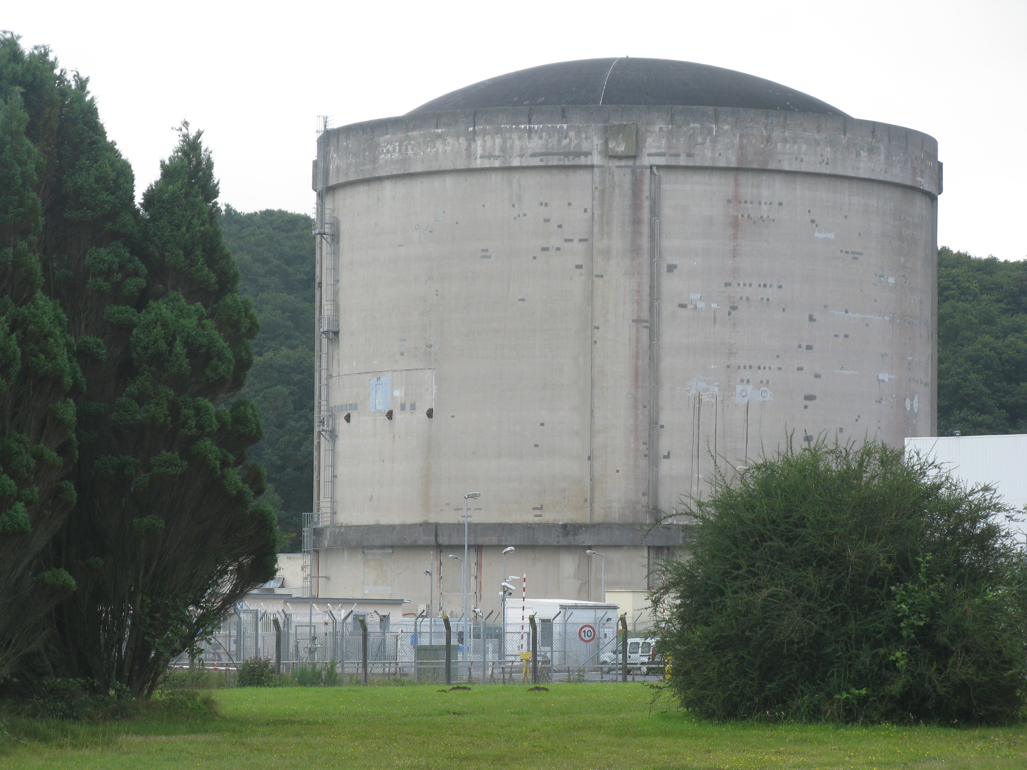 Reaktorgebäude des stillgelegten Kernkraftwerk Brennilis